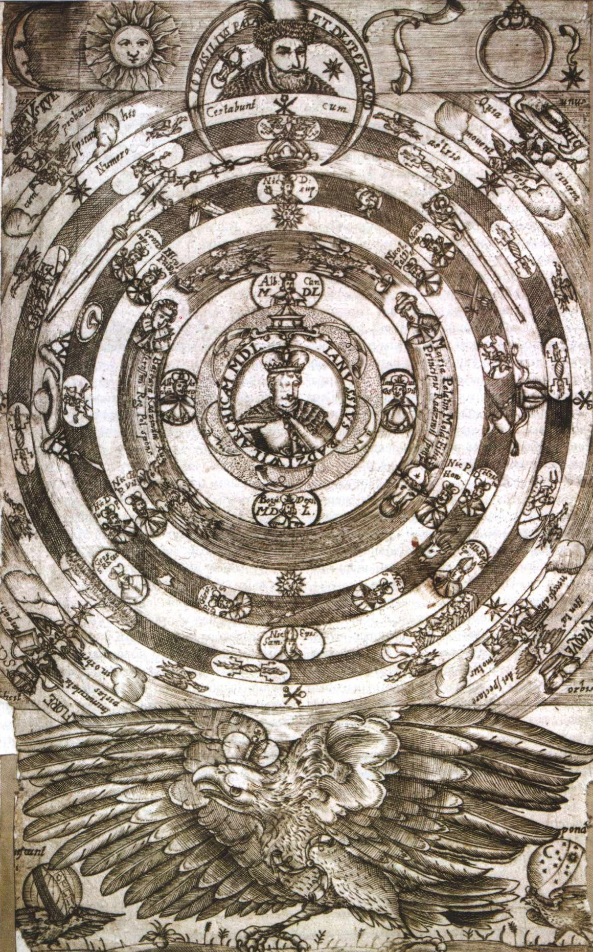 Беларуская (тарашкевіца): Януш Радзівіл